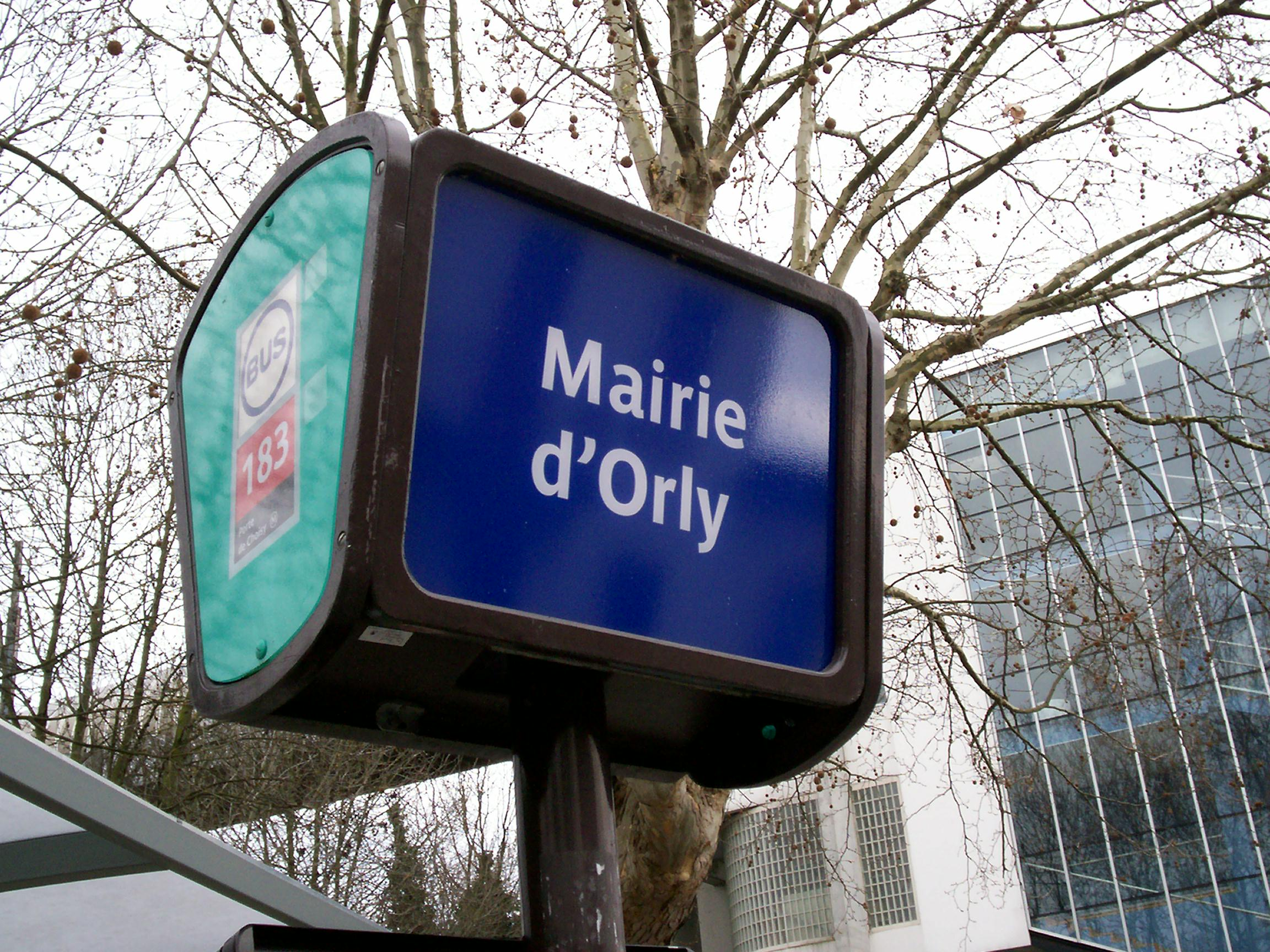 Signalétique à Mairie d'Orly